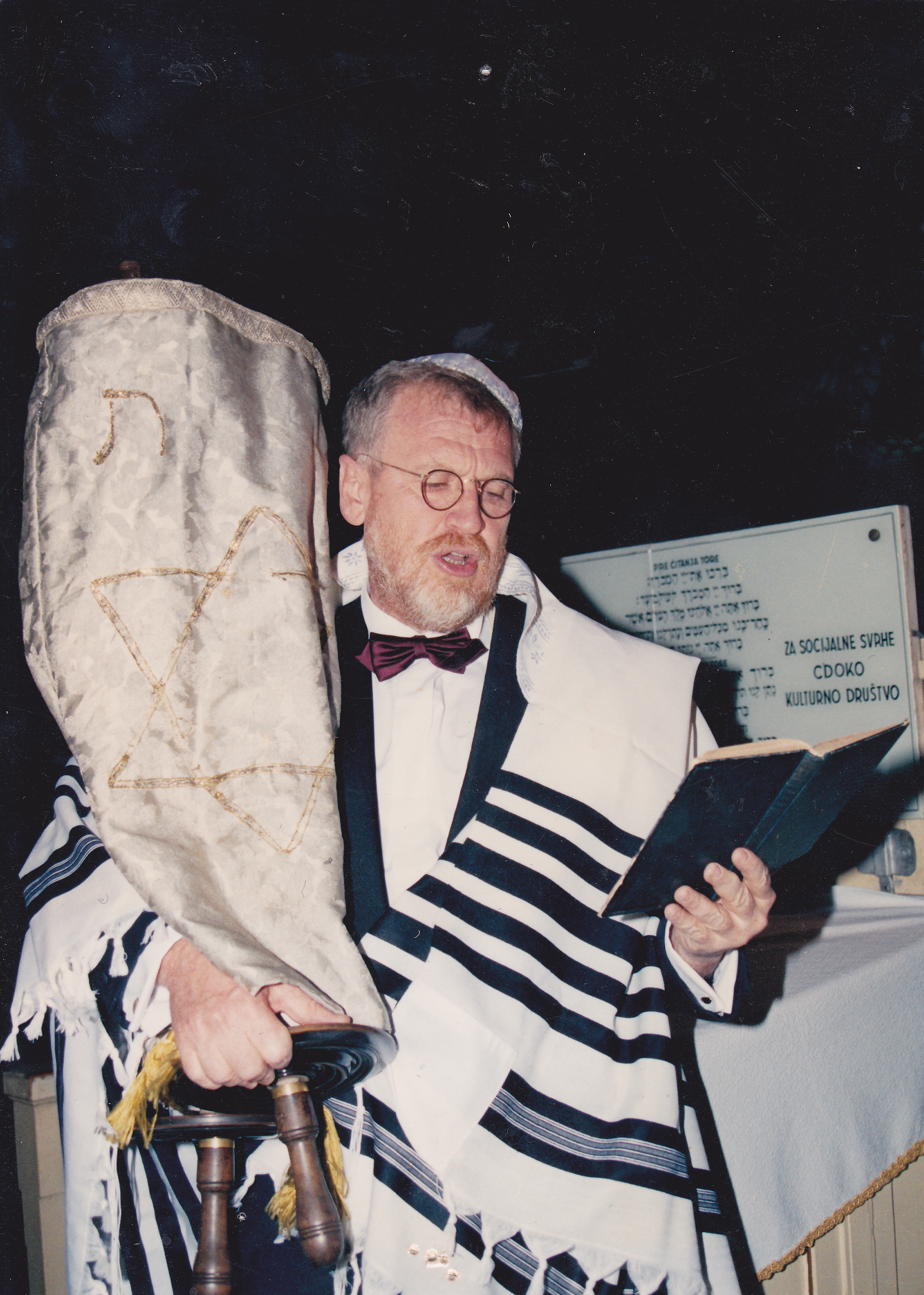 Halbrohr Tamás tóratekerccsel a kezében, Szabadkán